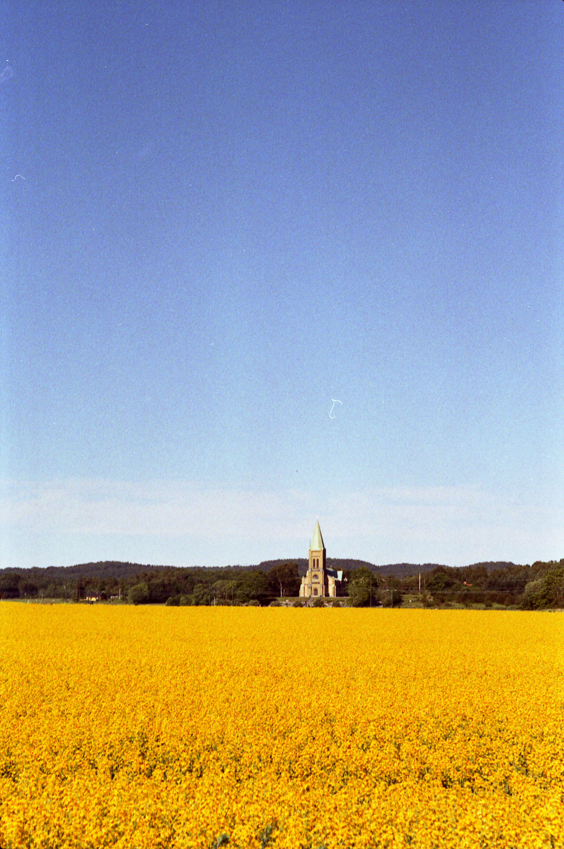 Ölmevalla kyrka bortom rapsfält. This is a scan from an negative. The date is scan date.